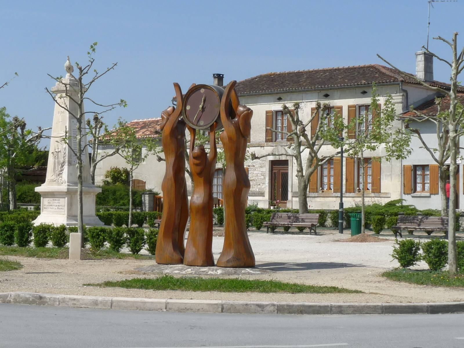 Place centrale de Bréville, Charente, France